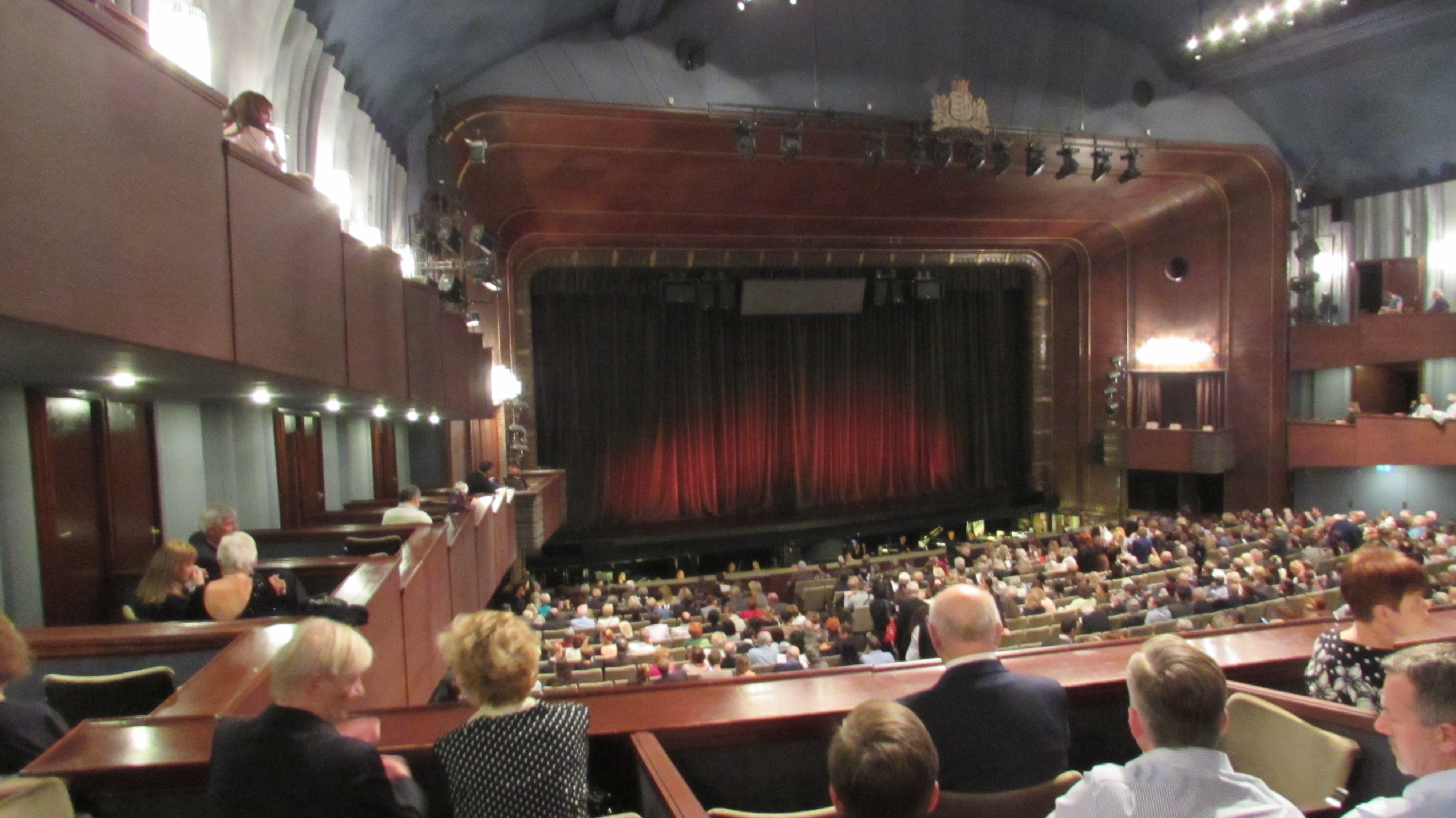 Budapest Erkel Theater Von Innen